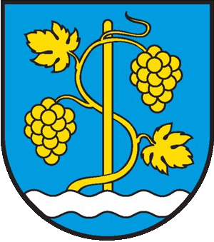 Wappen der auf den 1. Januar 2014 neu gebildeten Gemeinde Schinznach, Kanton Aargau